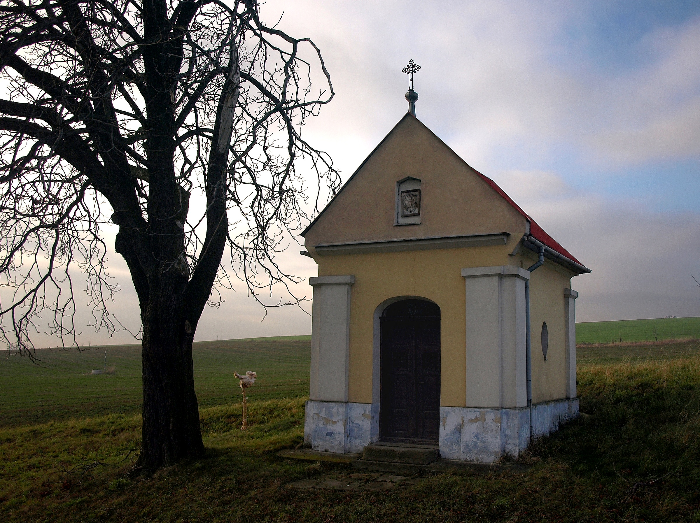 Kaple P. Marie (Bořenovice), Stádní, Bořenovice